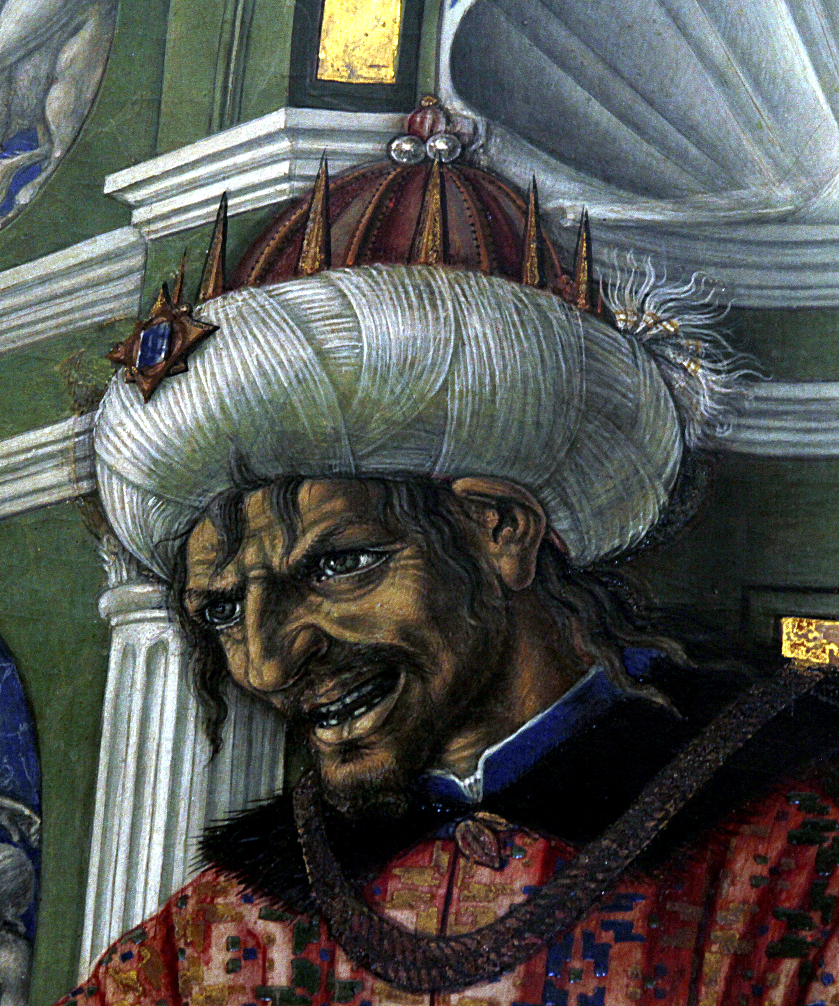 Santa Maria della Scala - Siena